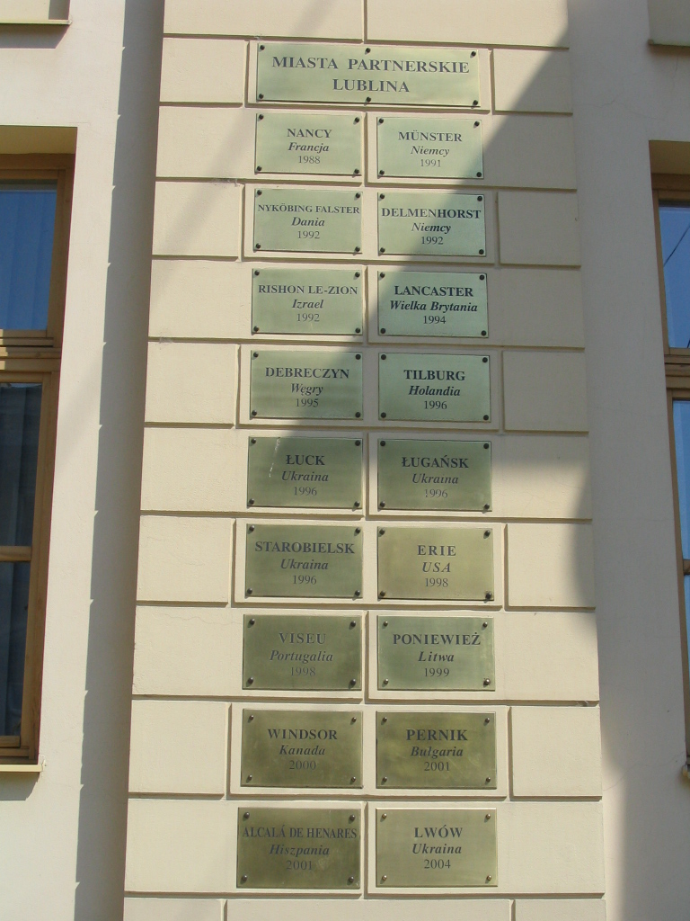 Ciudad hermanadas con Lublin